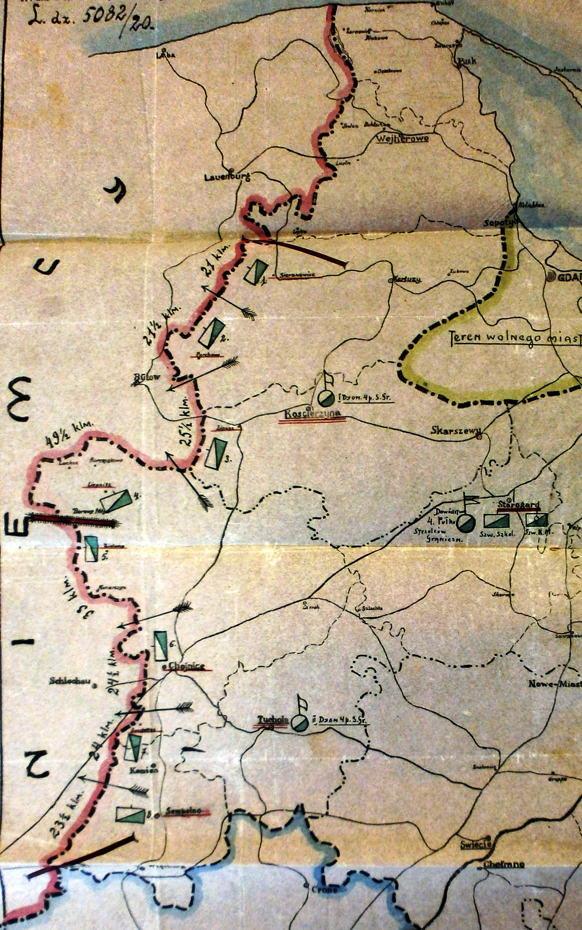 Rozmieszczenie 4 pułku Strzelców Celnych - 1920